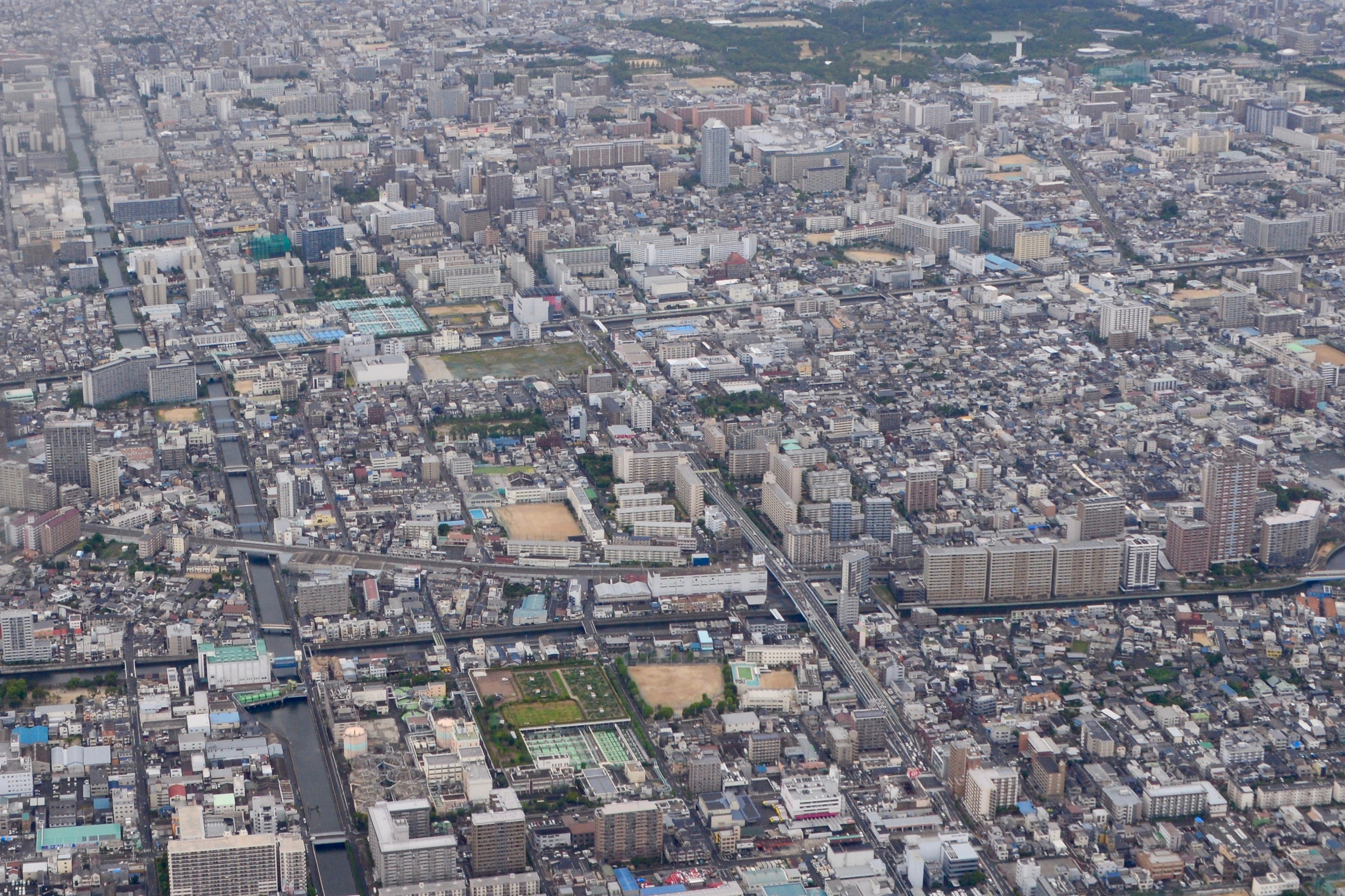 大阪市放出地区（鶴見区、城東区）。伊丹空港へ向かう機内より撮影